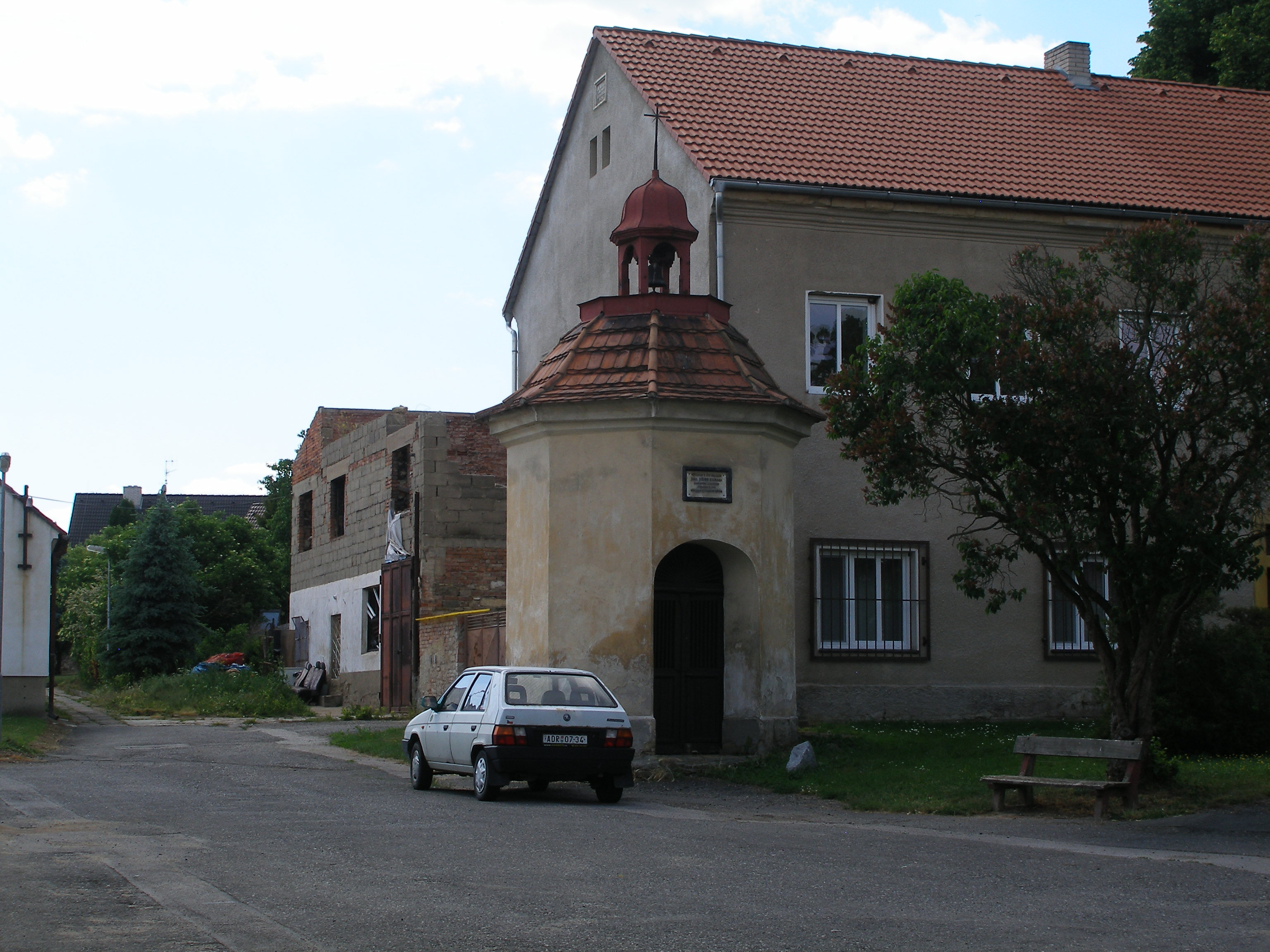 Kapilčka u návsi v Beřovicích.